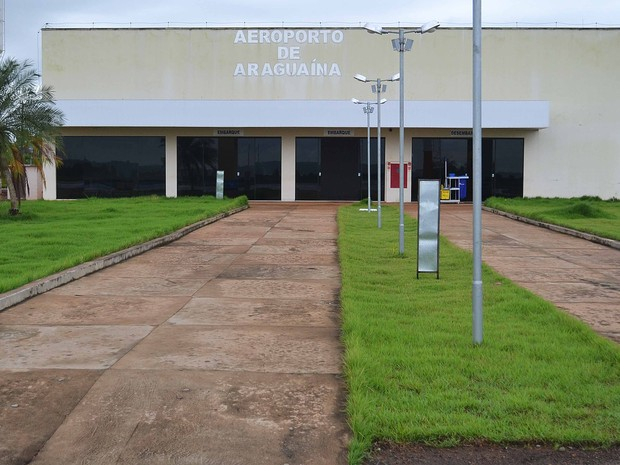 Aeroporto de Araguaína